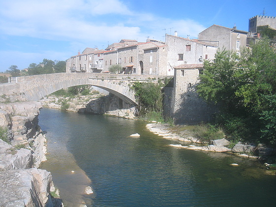 Vue de Ribaute